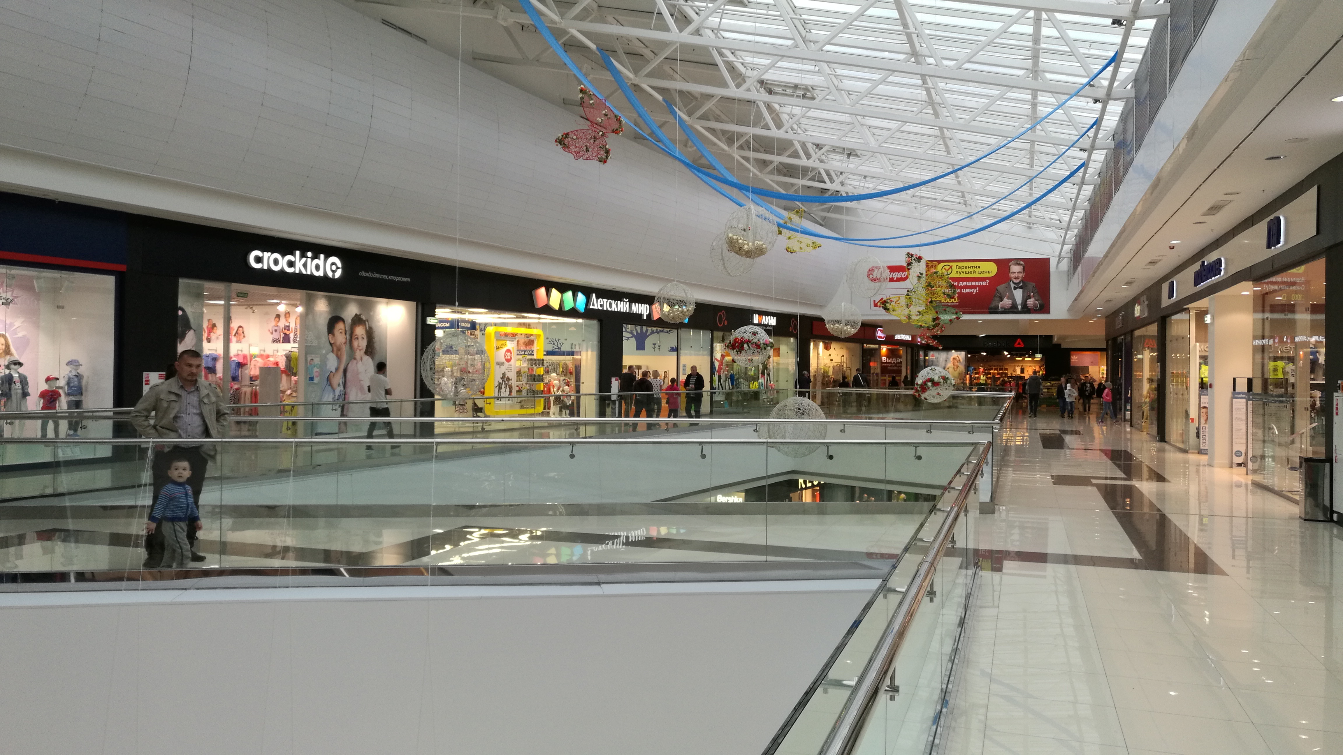 La dua etaĝo de la aĉetcentro "Kristal". Tjumeno, Rusio.